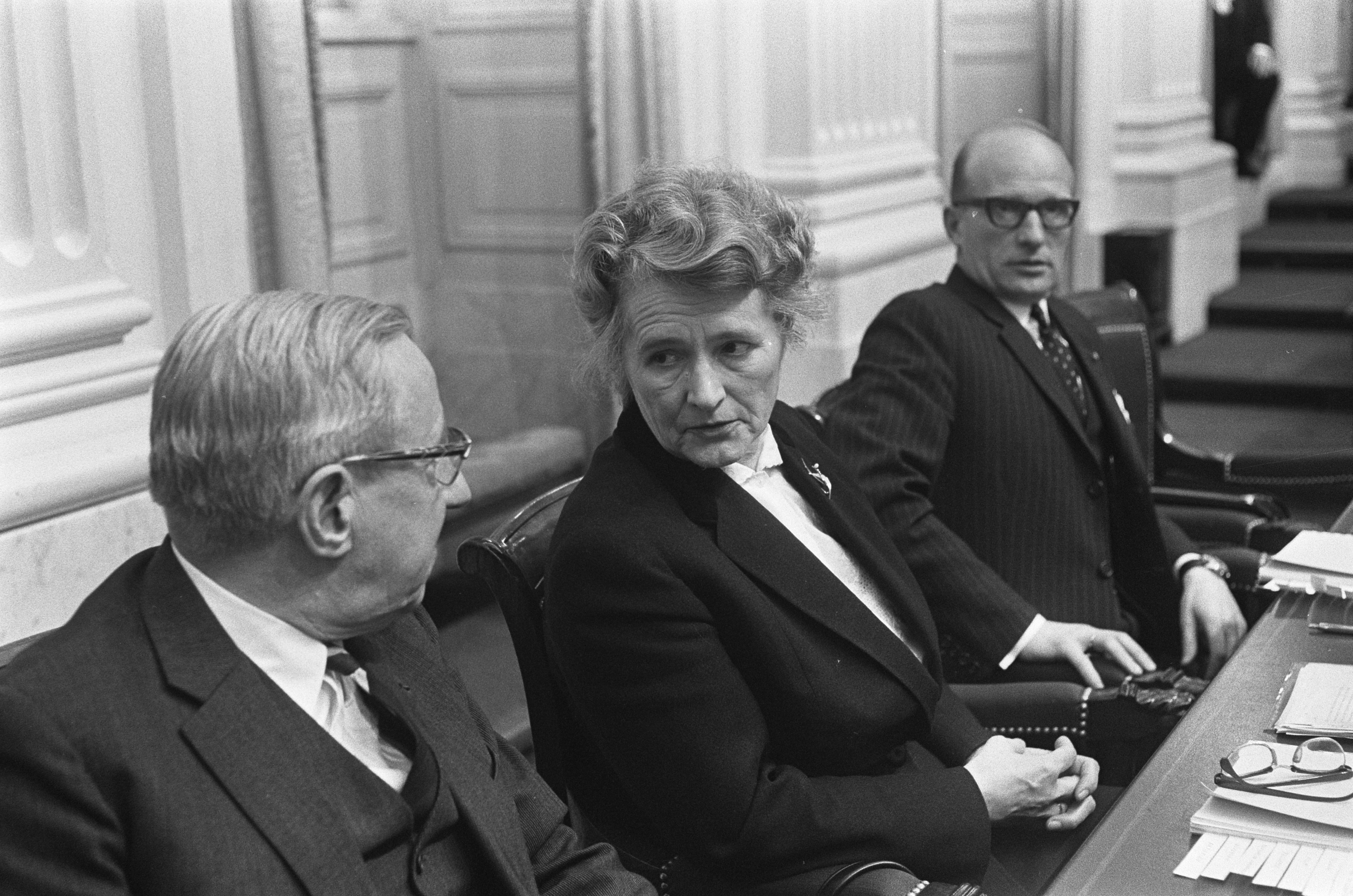 Collectie / Archief : Fotocollectie Anefo Reportage / Serie : [ onbekend ] Beschrijving : Behandeling van de omroep- en TV-wet in de Tweede Kamer; v.l.n.r.: minister De Quay, minister Klompé en dhr. Verhoeven (directeur-generaal Maatschappelijk Werk) Datum : 16 januari 1967 Locatie : Den Haag, Zuid-Holland Trefwoorden : ambtenaren, mediabeleid, ministers, parlementaire debatten, politiek Persoonsnaam : Klompé, Marga, Quay, J.E. de Fotograaf : Nijs, Jac. de / Anefo Auteursrechthebbende : Nationaal Archief Materiaalsoort : Negatief (zwart/wit) Nummer archiefinventaris : bekijk toegang 2.24.01.05 Bestanddeelnummer : 919-9886